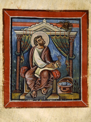 Saint Marc